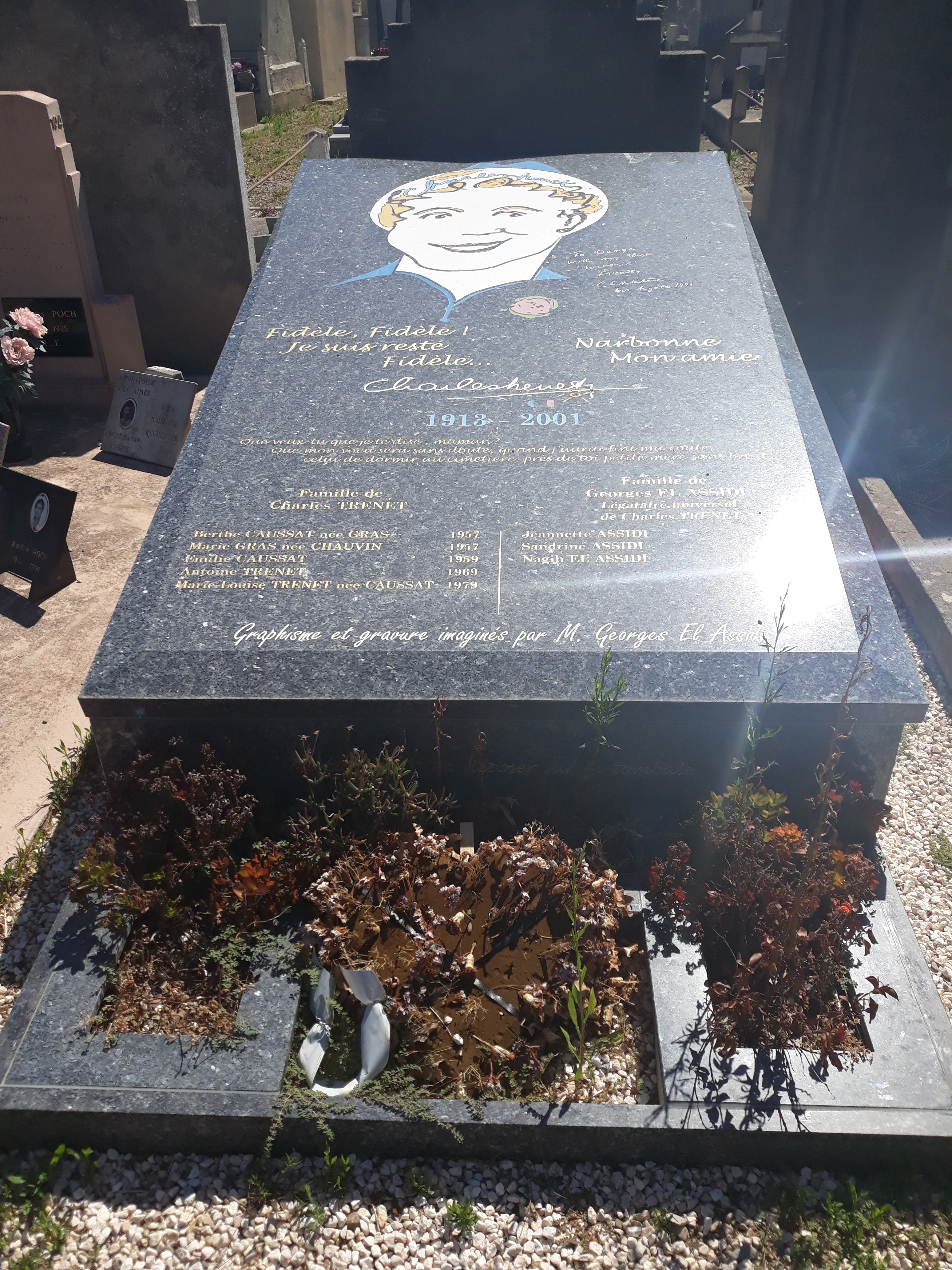 Das Grab des franzöischen Sängers Charles Trenet im Familiengrab auf dem Cimetière de l´Ouest in Narbonne.